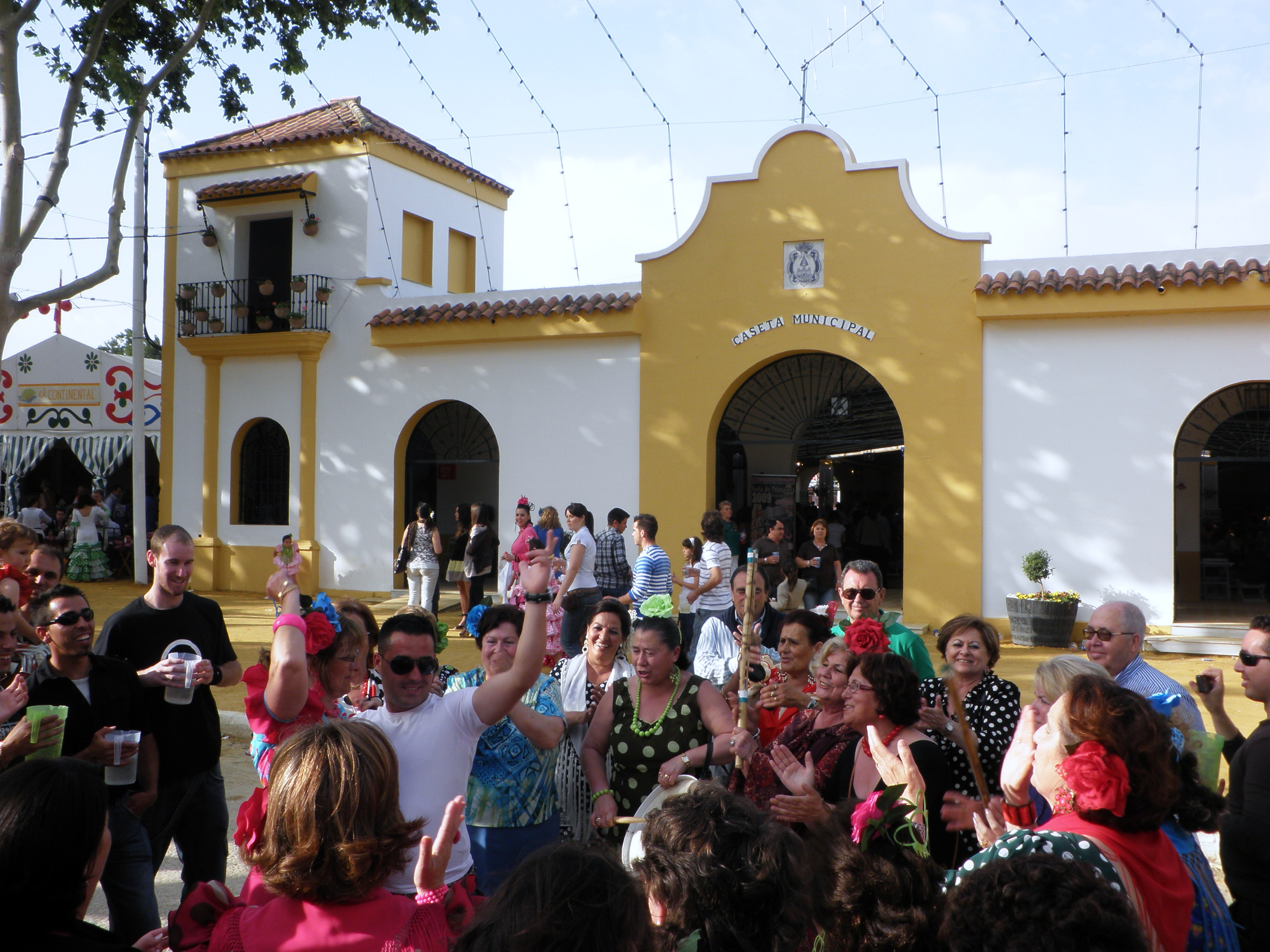 Caseta Municipal, Feria de Primavera y Fiesta del Vino Fino, El Puerto de Santa María.